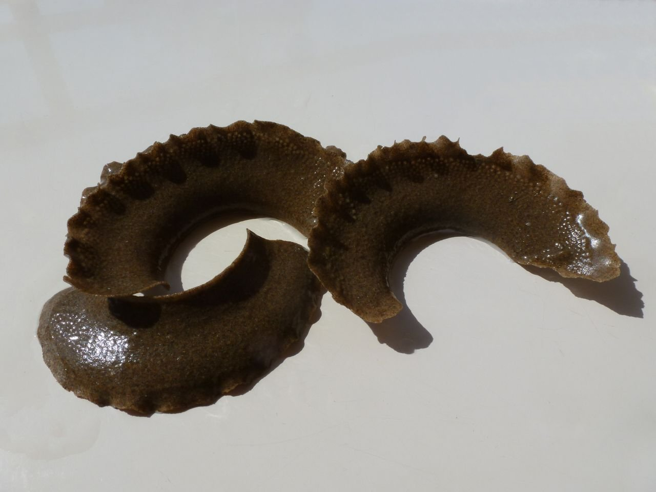 „Sandkragen“ (Eigelege) einer Mondschnecke (Familie Naticidae), Strandfund, Nordostspanien, Mai 2013, Breite ca. 3 cm, Durchmesser ca. 10 cm